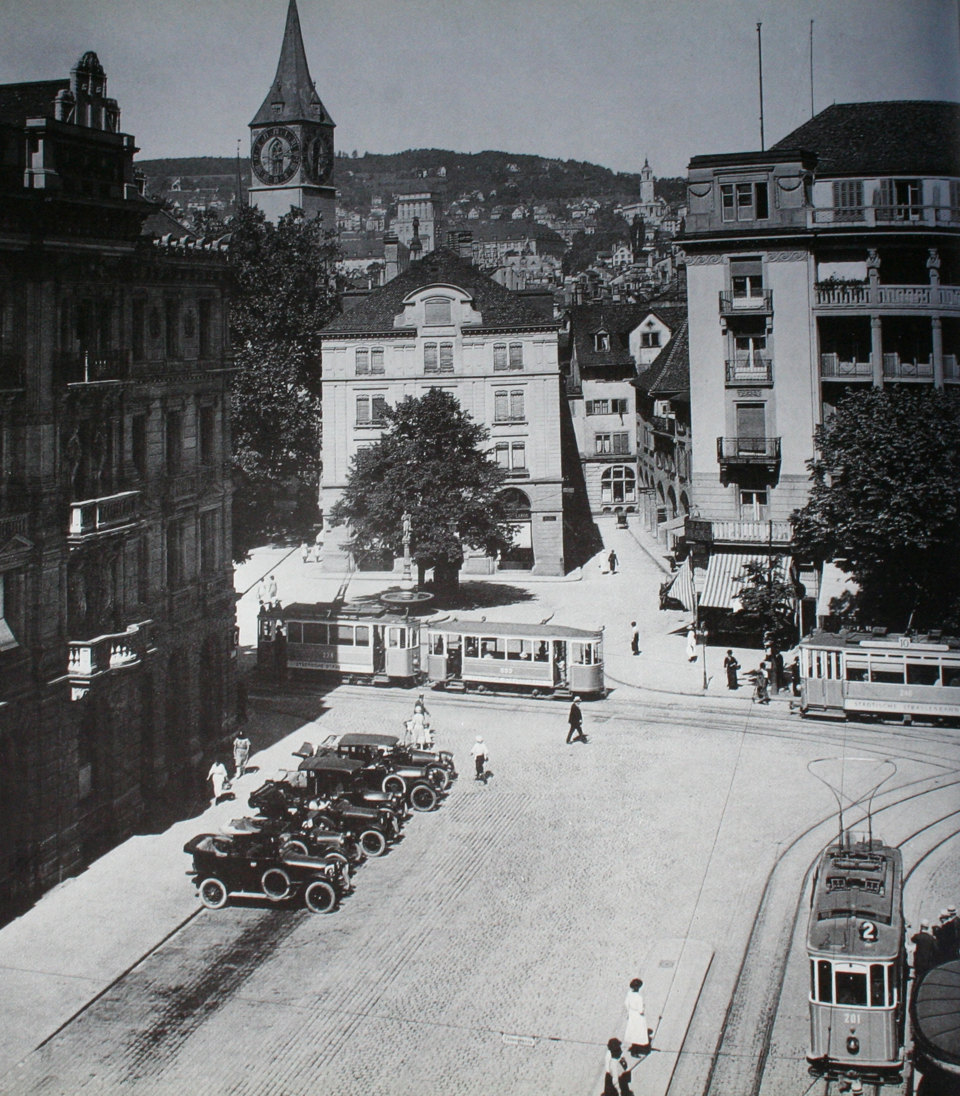 Paradeplatz um 1925; links Taxis